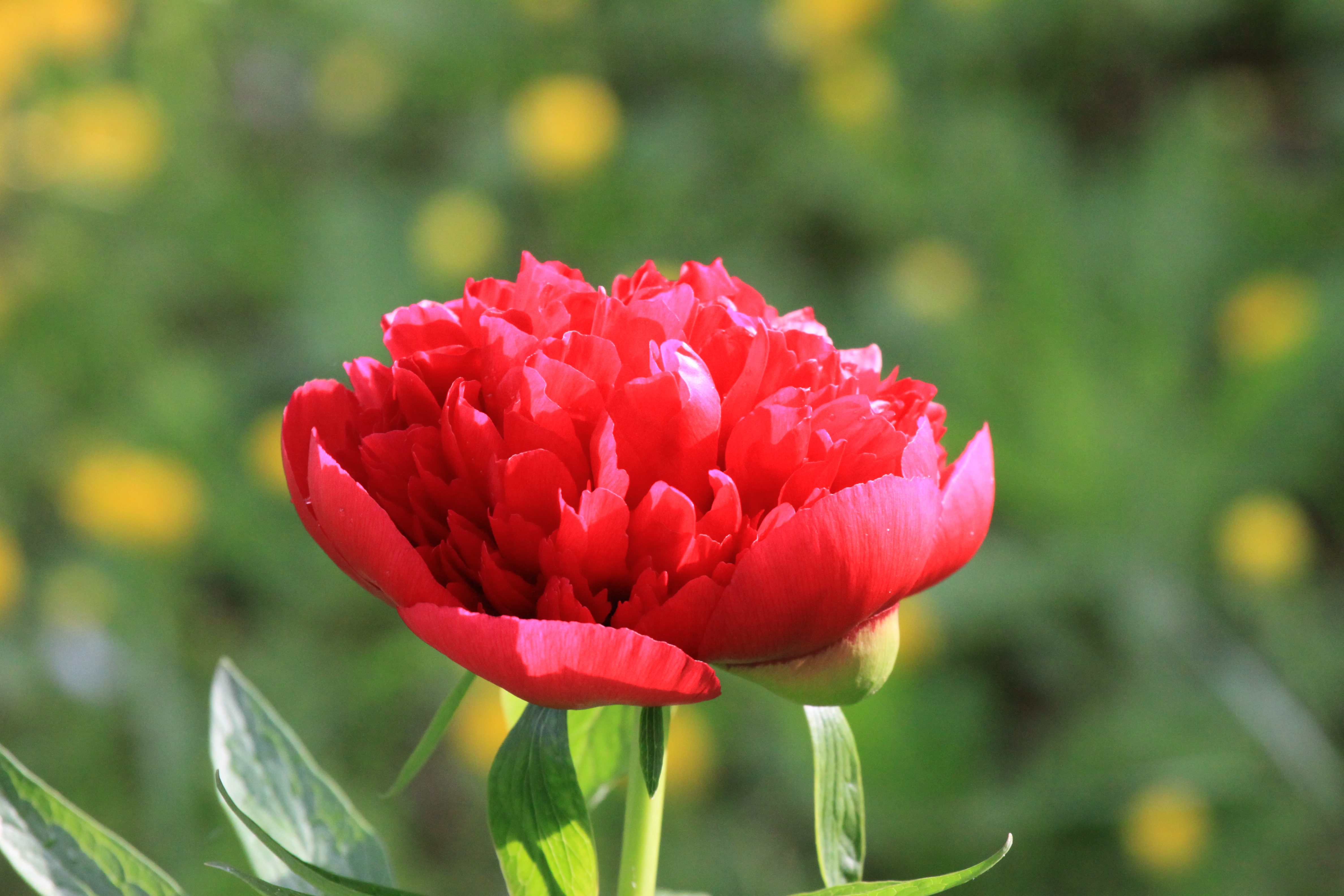 Une pivoine officinale dans un jardin à La Rochelle (France).